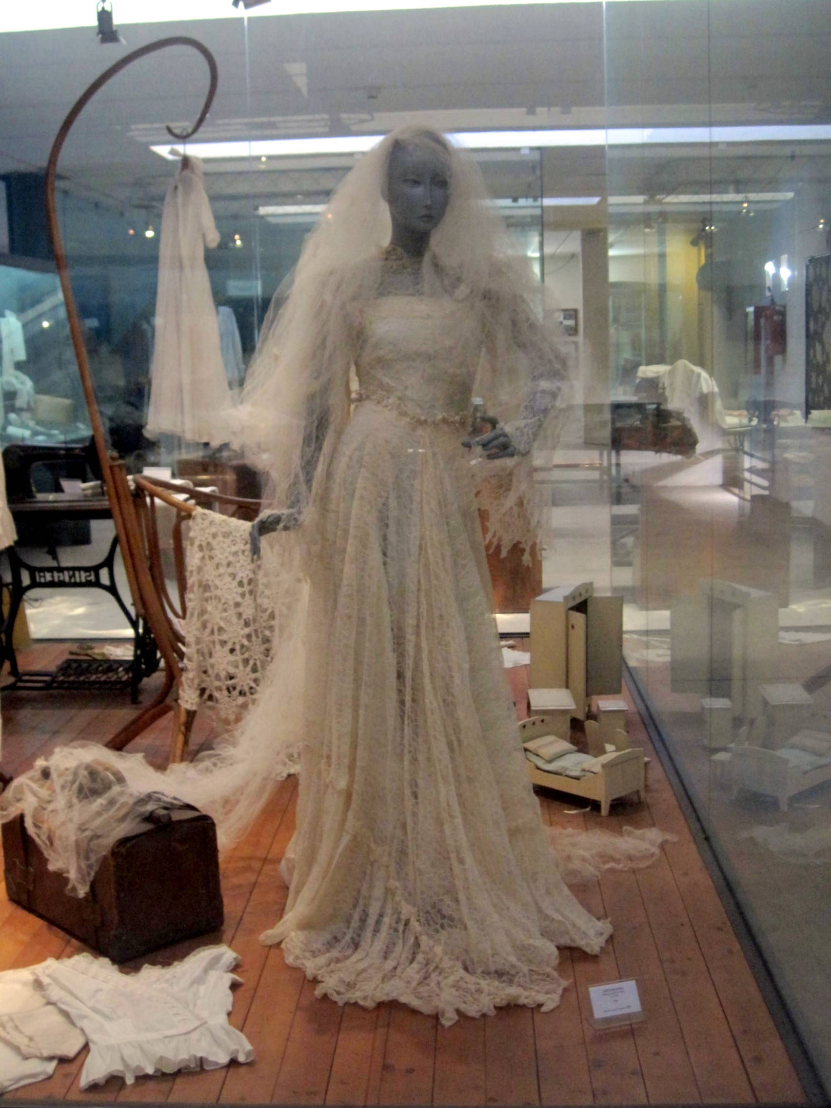 Museo del tessile e della tradizione industriale This is a photo of a monument which is part of cultural heritage of Italy.